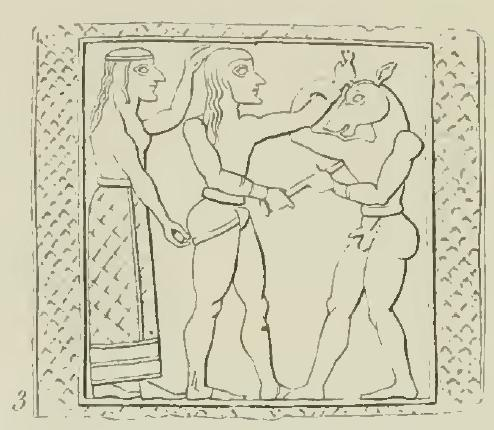 Goldplättchen mit geprägter Kampfszene zwischen Theseus und Minotaurus